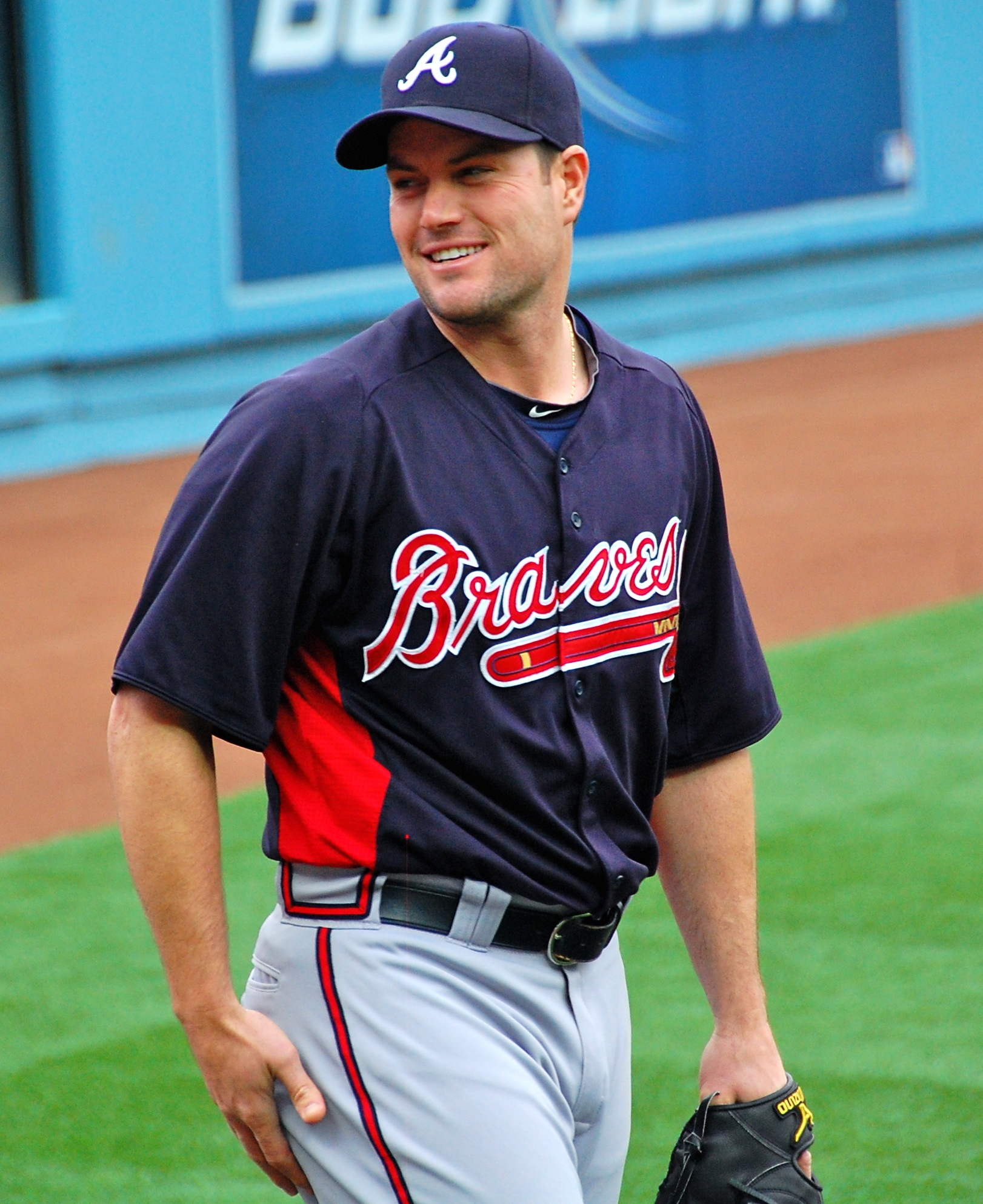 Matt Diaz at Dodger Stadium, 2012